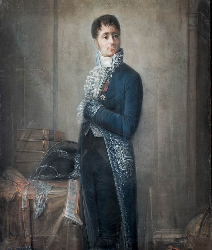 Ce portrait (attribué à un élève de David, Claude Gautherot, 1769-1825) mérite qu'on s'y arrête un peu plus, pour sa mise en scène particulièrement étudiée. D'abord, le visage d'un beau jeune homme en un temps de romantisme naissant: de fait, Fourier a 34 ans lorsqu'il est nommé; les dessins le représentant plus en rondeur ont pour modèle un homme d'âge mûr (éditions posthumes de la Théorie de la Chaleur, caricature des membres de l'institut par Boilly, que nous montrons plus bas). Ensuite, les inévitables attributs de sa fonction: l'habit, le chapeau, l'épée... auxquels il joint une posture bien napoléonienne -vaut-elle allégeance et fidélité? On s'arrêtera davantage sur les livres: là, le choix revendiqué ne fait aucun doute! Derrière lui, Platon et Cicéron marquent son goût pour les humanités classiques; dans sa main, on reconnaît les Principia de Newton, à l'une des figures qui appuient la démonstration du mouvement elliptique des planètes à partir de la loi d'attraction universelle.